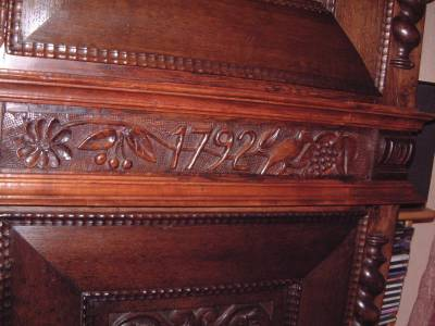 Je suis l'auteur de la photo et de réalisateur du meuble